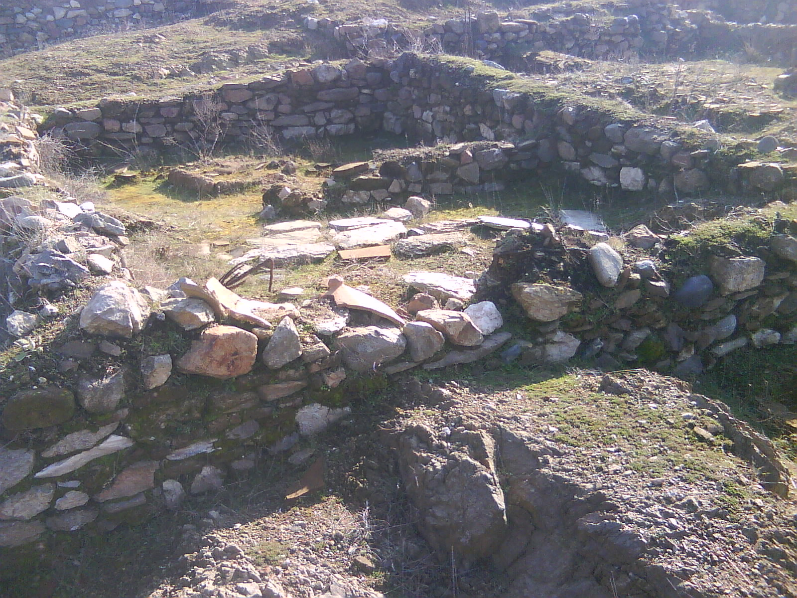 Isar Marvinci